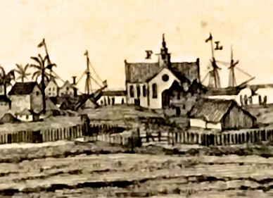 Igreja Calvinista dos Franceses do Recife, detalhe da gravura BOA VISTA, de Frans Post (c. 1647)